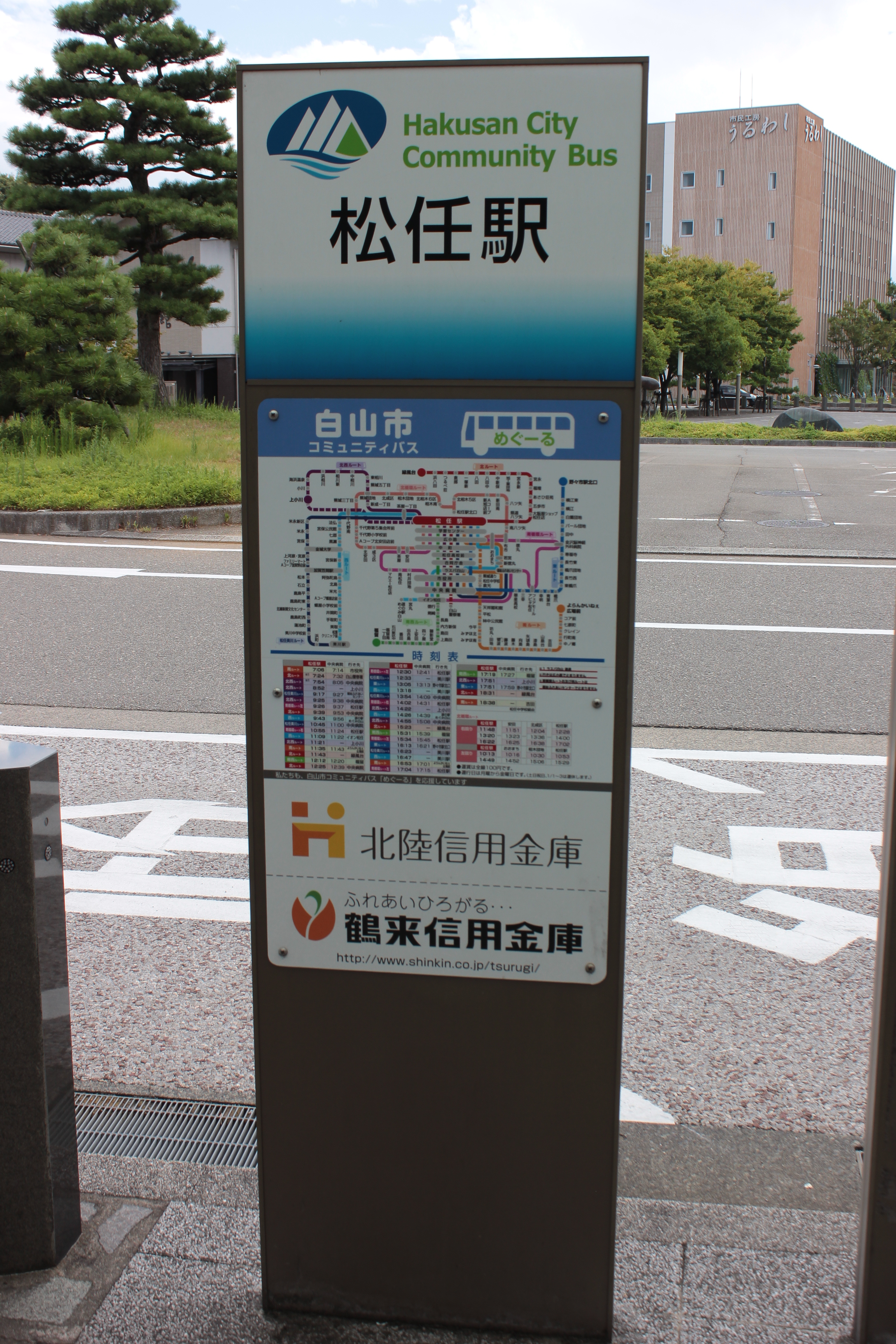 めぐーるのバス停の一例（松任駅） Canon EOS Kiss X5